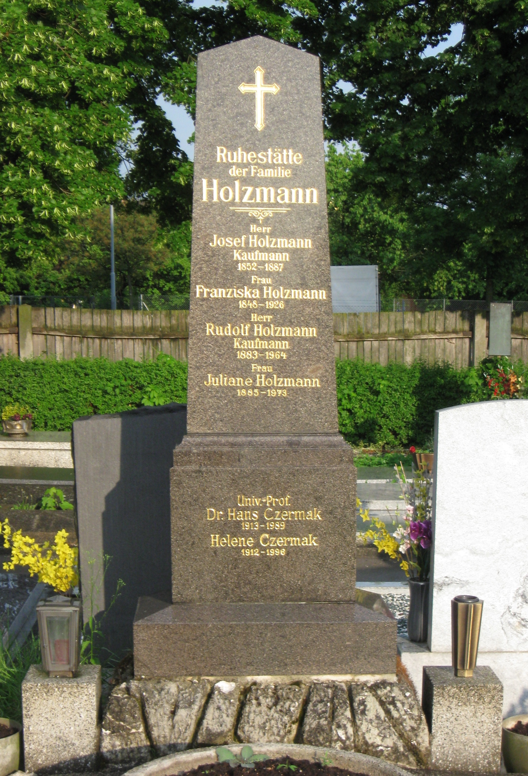 Grab von Hans Czermak (1913–1989) und seiner Frau Helene, geb. Holzmann, auf dem Groß-Jedlersdorfer Friedhof (Gruppe PR, Nummer 74).